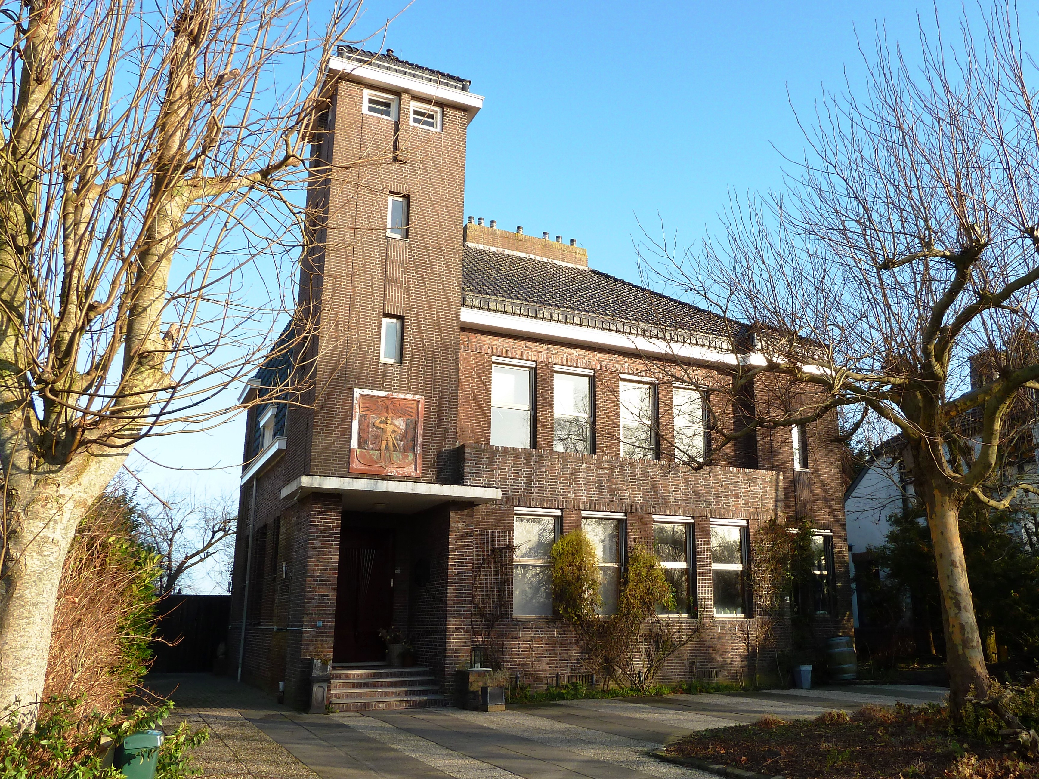 Het oude gemeentehuis van Stedum. In 1926 gebouwd naar een ontwerp van Jan Benninga.